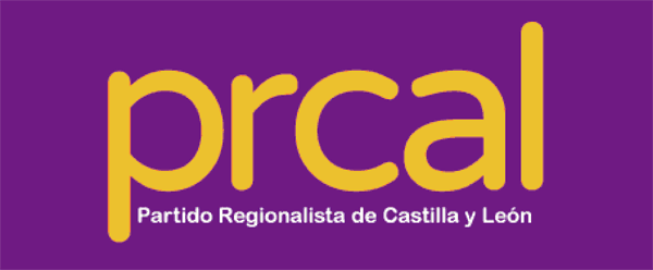 Logo PRCAL